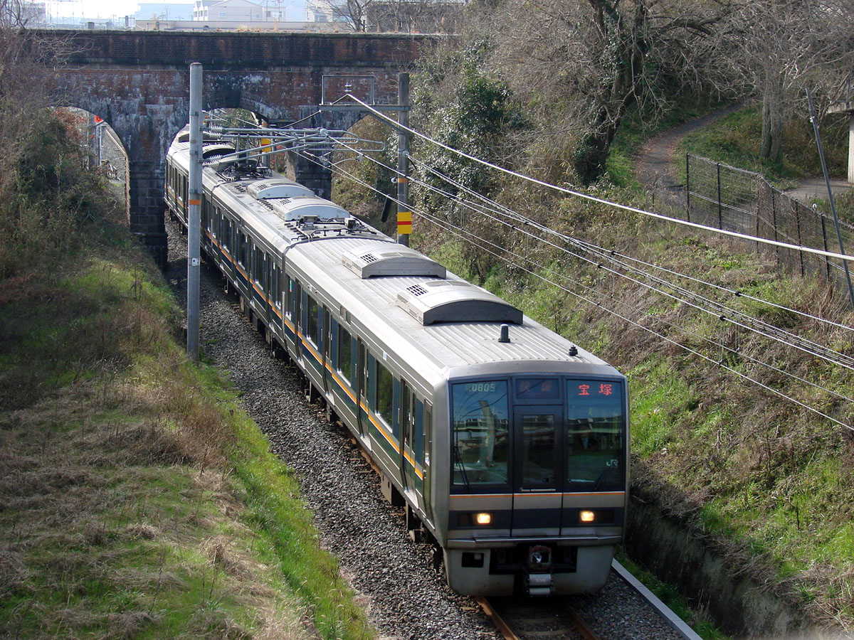 学研都市線同志社前駅 - 京田辺駅間にあるミツマンボをくぐる207系